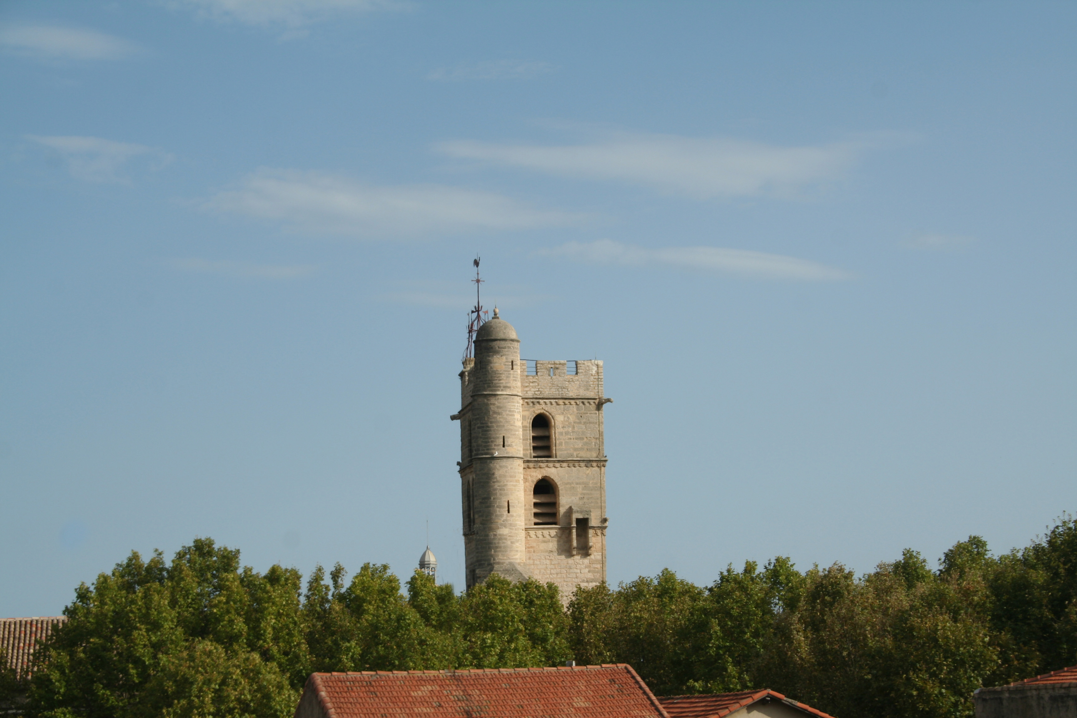 Frontignan (Hérault) - Église Saint-Paul - clocher.